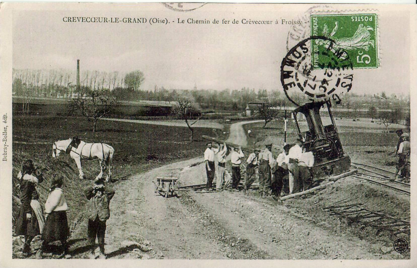 carte postale ancienne éditée par Debray-Bollez à Crèvecœur-le-Grand : CRÈVECŒUR-LE-GRAND : Le chemin de fer de Crèvecœur à FroissyLocomotive de chantier à voie étroite - déraillée - d'un train de travaux de construction de la ligne.